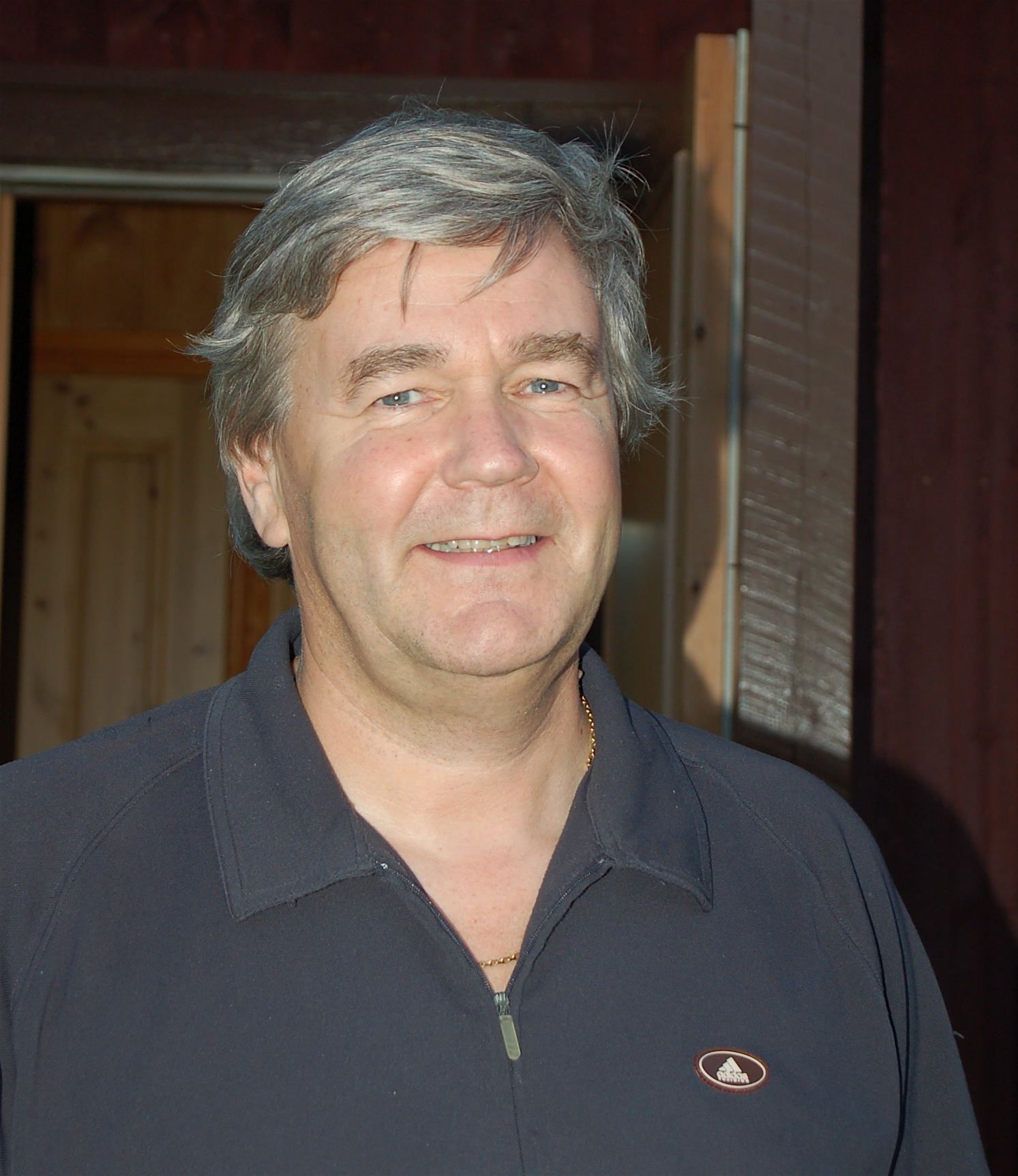 Trond Kjøll, skytterkonge 1995